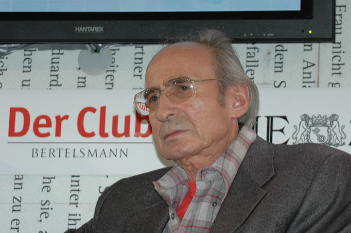 Nur für redaktionelle Nutzung / Editorial use only. Dieses Foto dürfen Sie honorarfrei nutzen, wenn Sie folgenden credit beachten: Copyright: Das blaue Sofa / Club Bertelsmann. Peter Rühmkorf (1929 – 2008) studierte Germanistik und Psychologie in Hamburg und schrieb ab 1953 unter Pseudonym für den „studentenkurier“ (später „konkret“) die Kolumne „Lyrikschlachthof“. 1958-63 war er Verlagslektor, 1964/65 Stipendiat der Villa Massimo in Rom. Er hielt Gastvorlesungen in den USA, war Gastdozent an der Universität Paderborn, Ehrendoktor der Universität Gießen und Freier Schriftsteller. Rühmkorf wurde mit zahlreichen Preisen ausgezeichnet: Erich-Kästner-Preis (1979), Bremer Literaturpreis (1980), Arno Schmidt-Preis (1986), documenta-Schreiber Kassel ( 1987), Heinrich-Heine-Preis (1988) und den Georg-Büchner-Preis (1993).